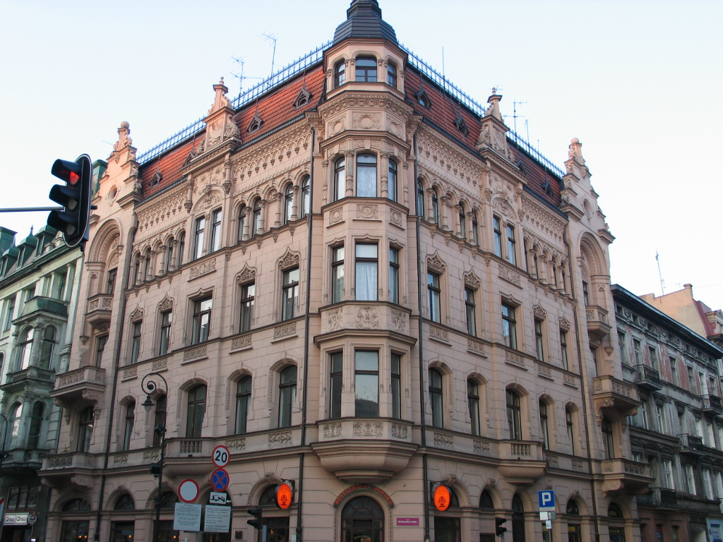 Łódź, Kamienica Dawida Sendrowicza